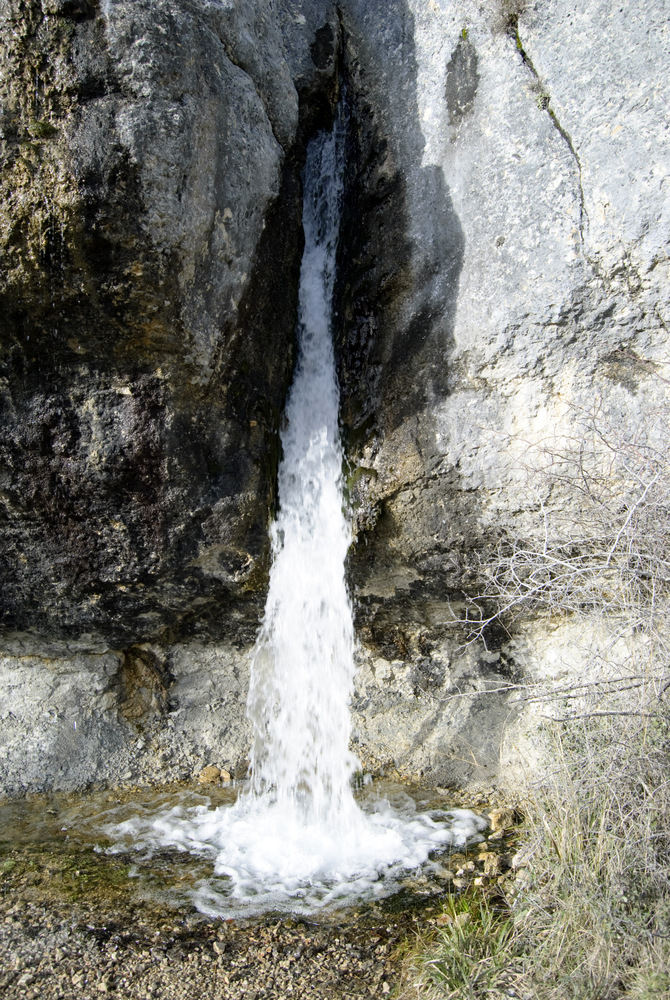 Surgencia de "El Potrillo", junto a la de "Yeguamea"